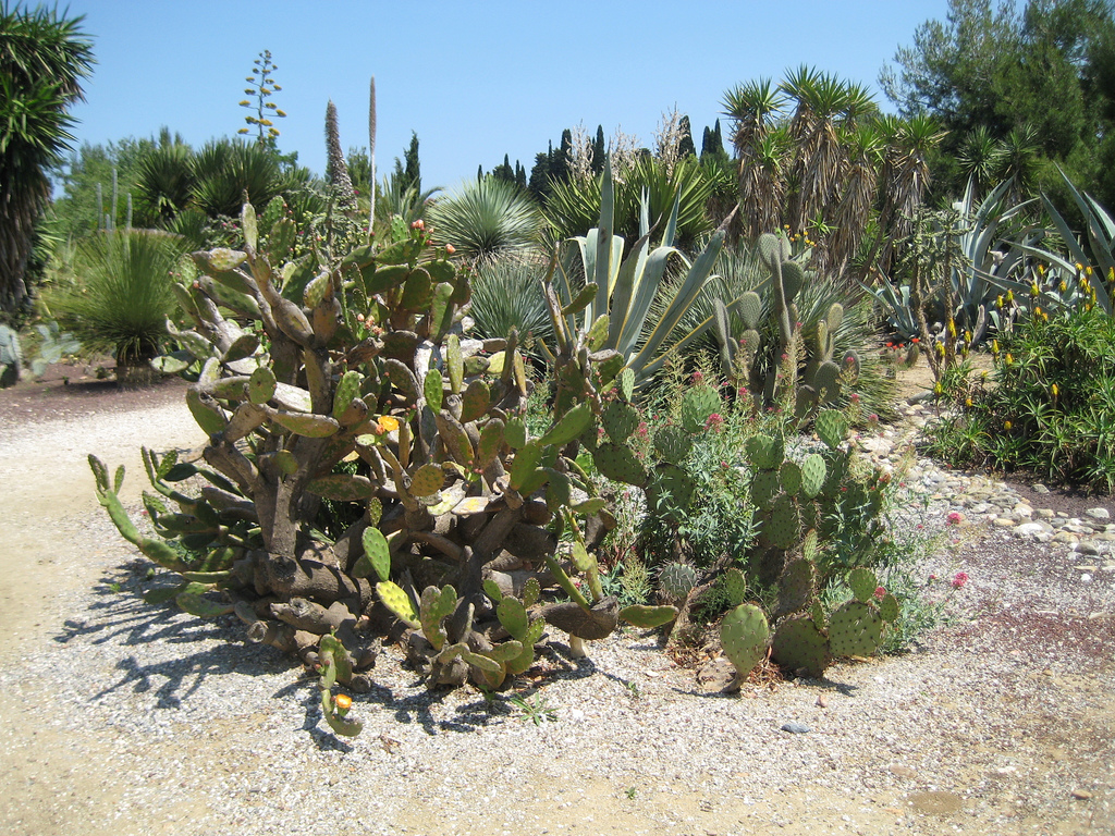 Massif piquant